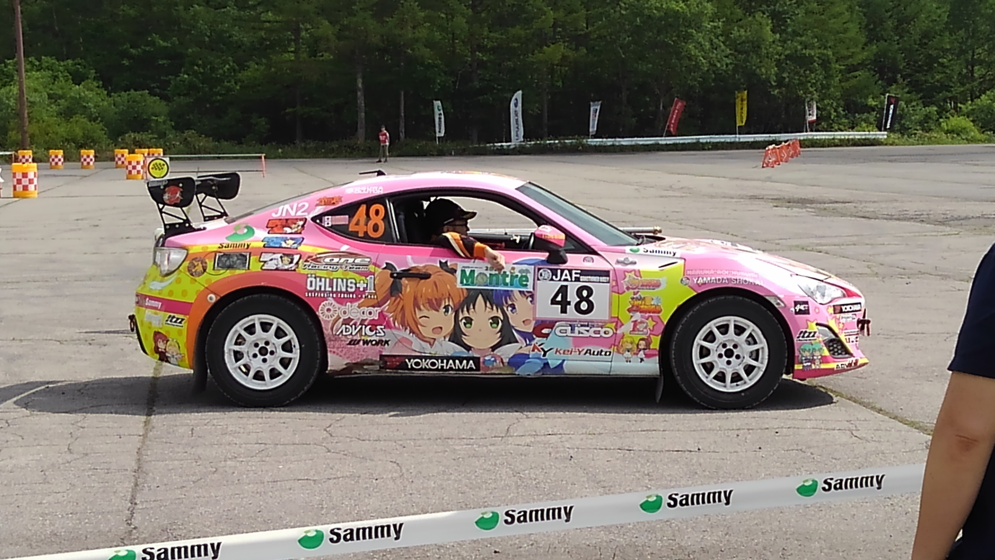 全日本ラリー選手権にて、アニメとタイアップした86